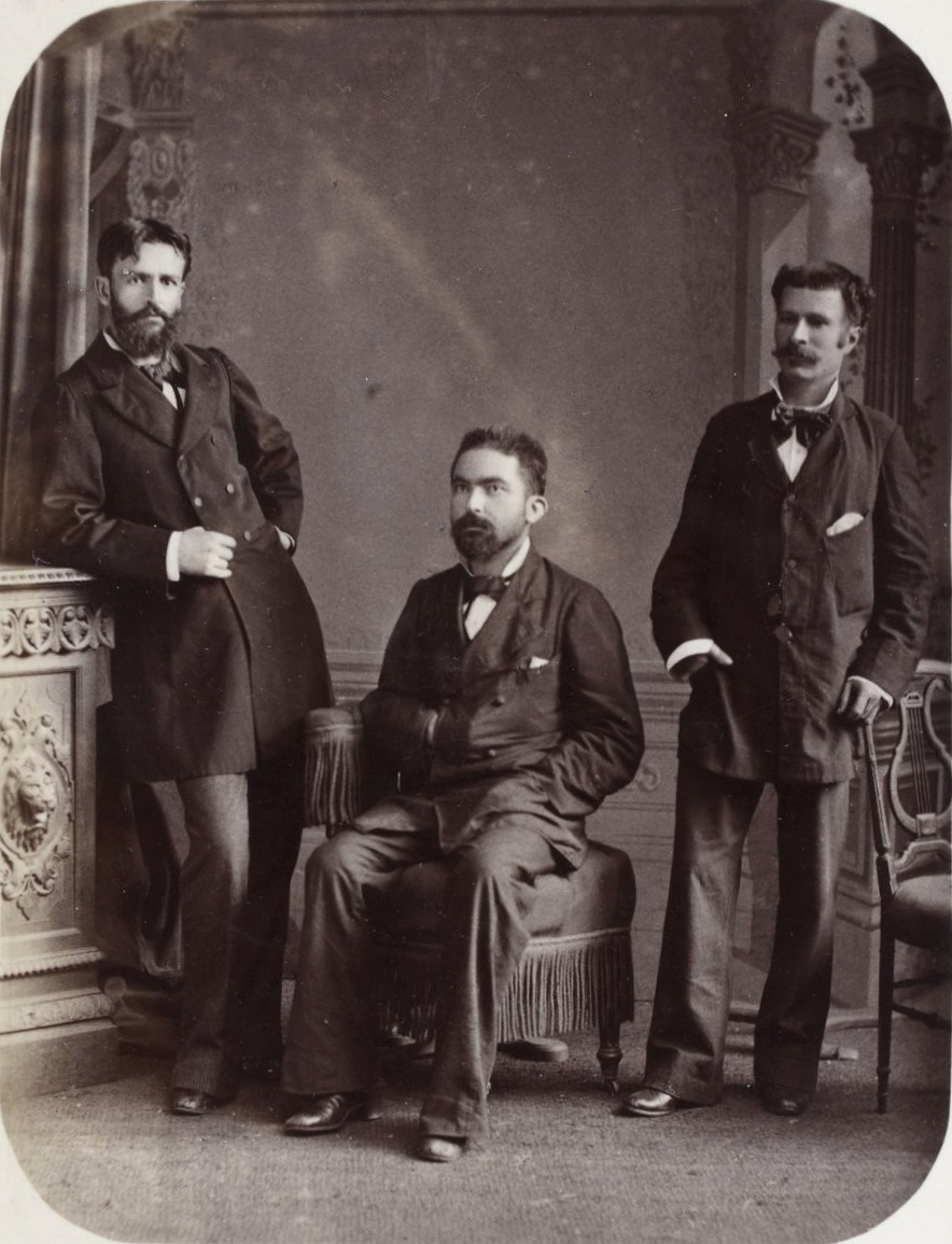 Joseph-Marie Roche, Henri Coudreau, and Clément Demont